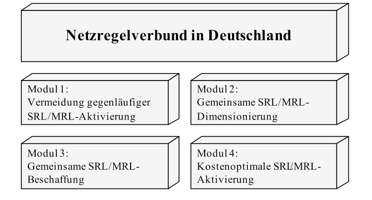 Module des Netzregelverbundes (NRV)